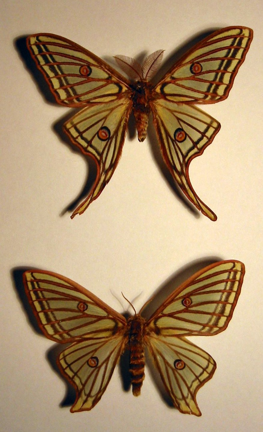 Graellsia isabellae, male and female